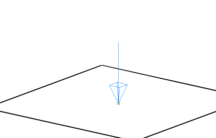 Plaatje van een puntlast op een plaat